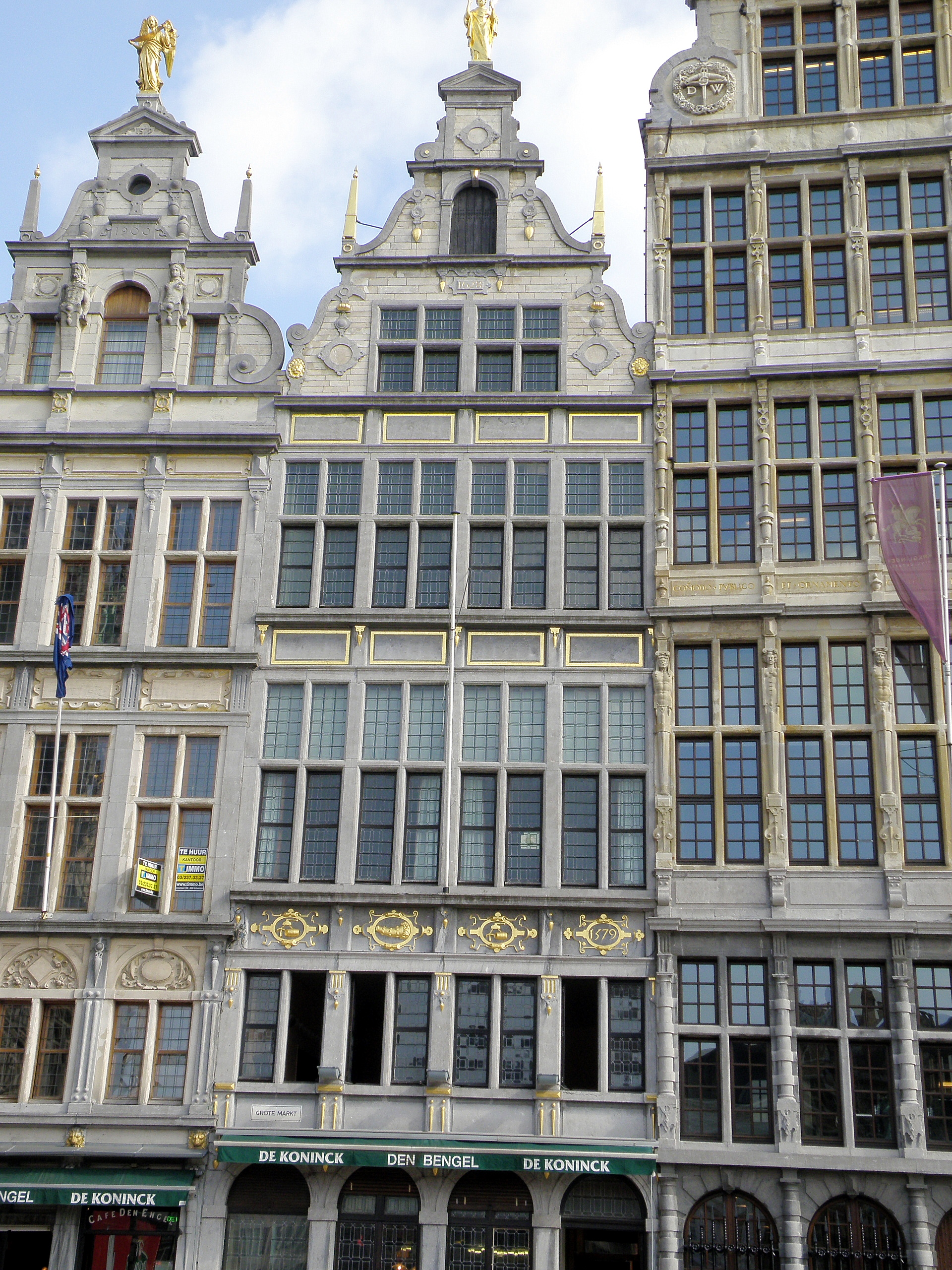 Antwerpen, Grote Markt. Ambachtshuis De Mouwe (nr.5), uit 1579, geveltop uit 1628, kamer van het Kuipersambacht. Restauratie Leonard Blomme 1907. Huis links (Grote Markt nr.3) is Huis Witten Engel, 1900; huis rechts (Grote Markt nr.7): Huis Spaengien, 1582. Vgl. verder Inventaris Vlaams Bouwkundig Erfgoed.